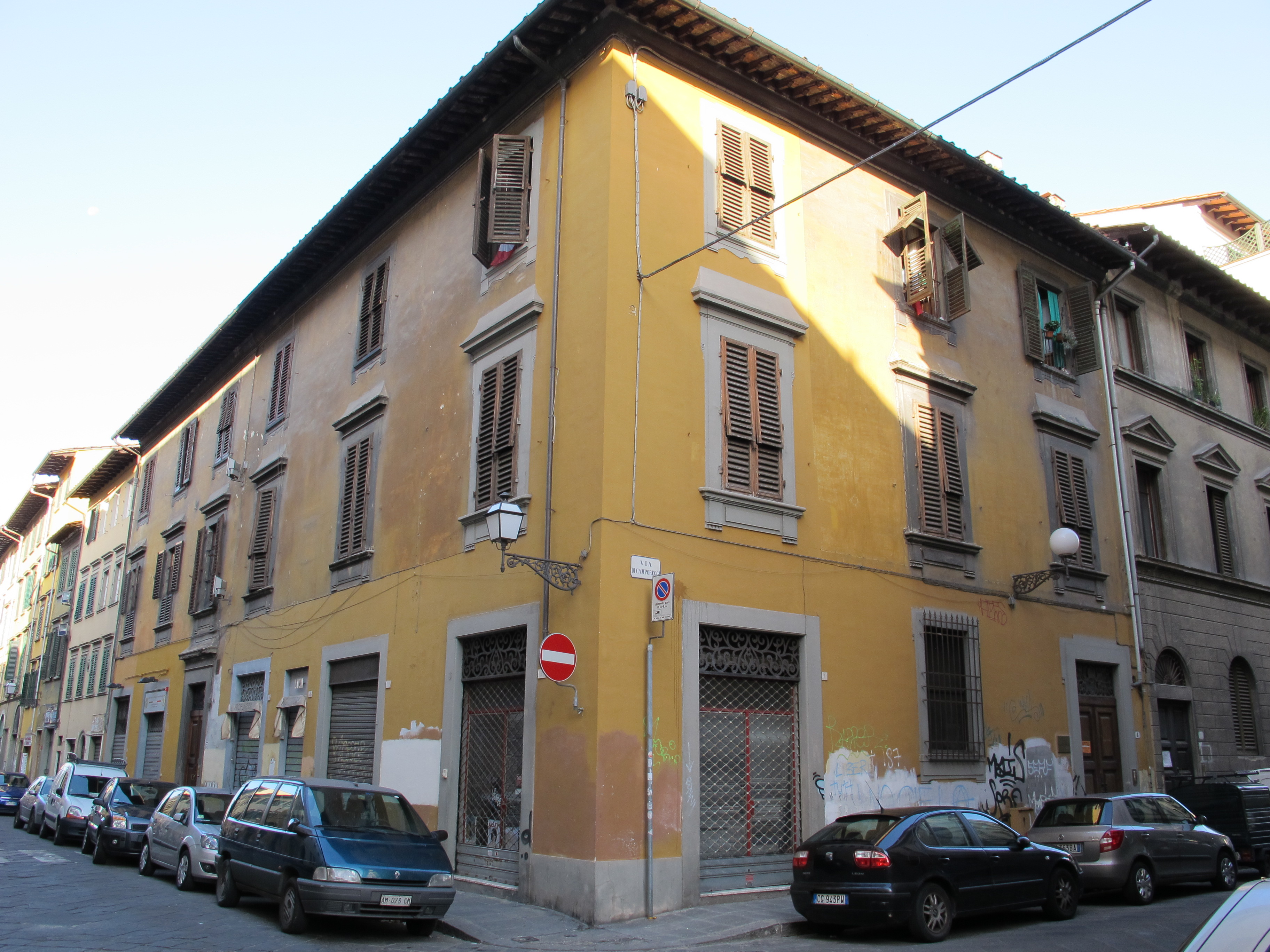 Ospedale degli incurabili